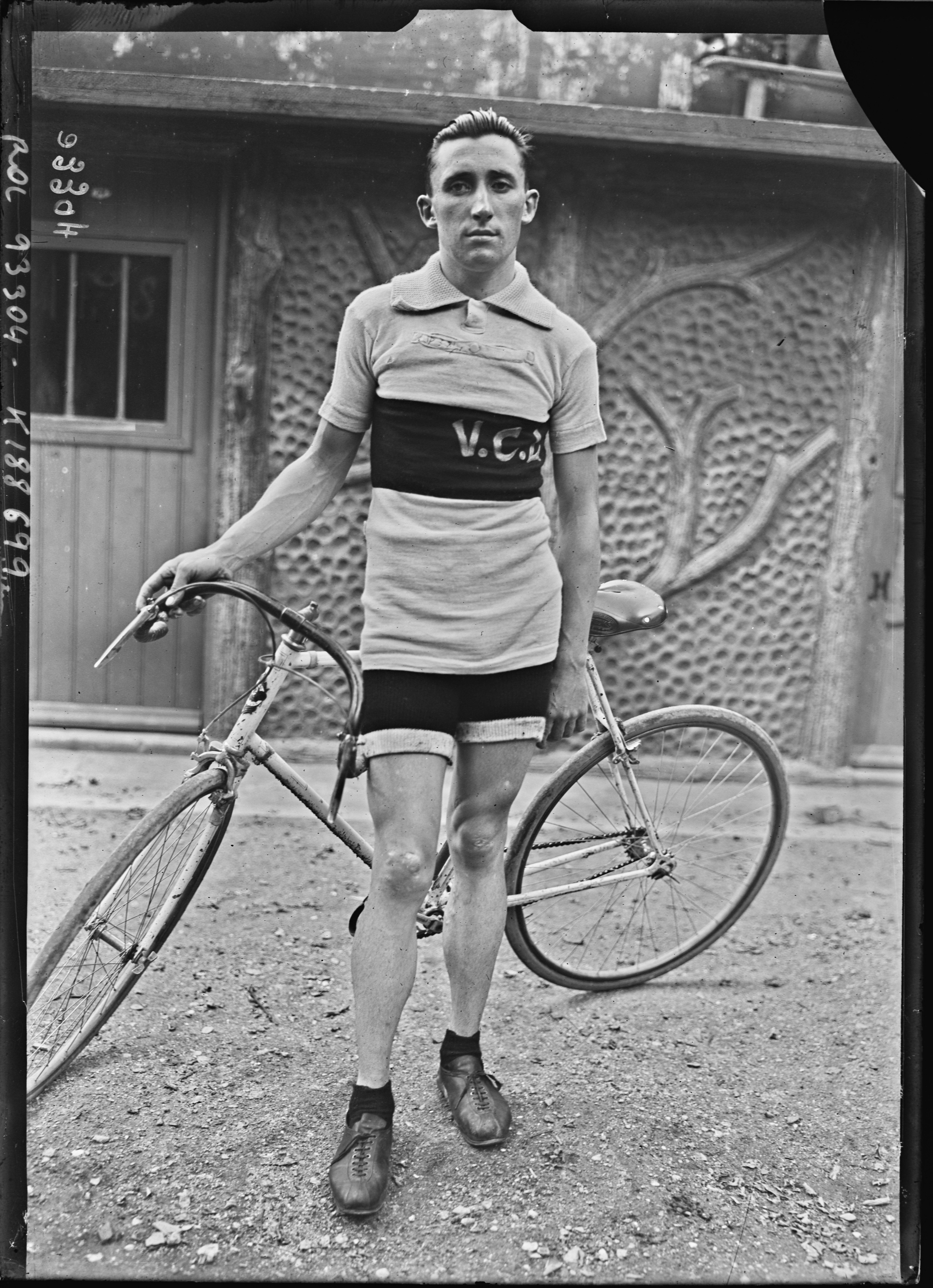 Julien Moineau, coureur cycliste arrivé 3e du championnat militaire des 100 km, à Vincennes, le 28 juin 1924